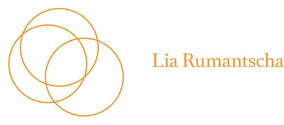 Logo Lia Rumantscha (2015) Rumantsch: Logo Lia Rumantscha (2015)